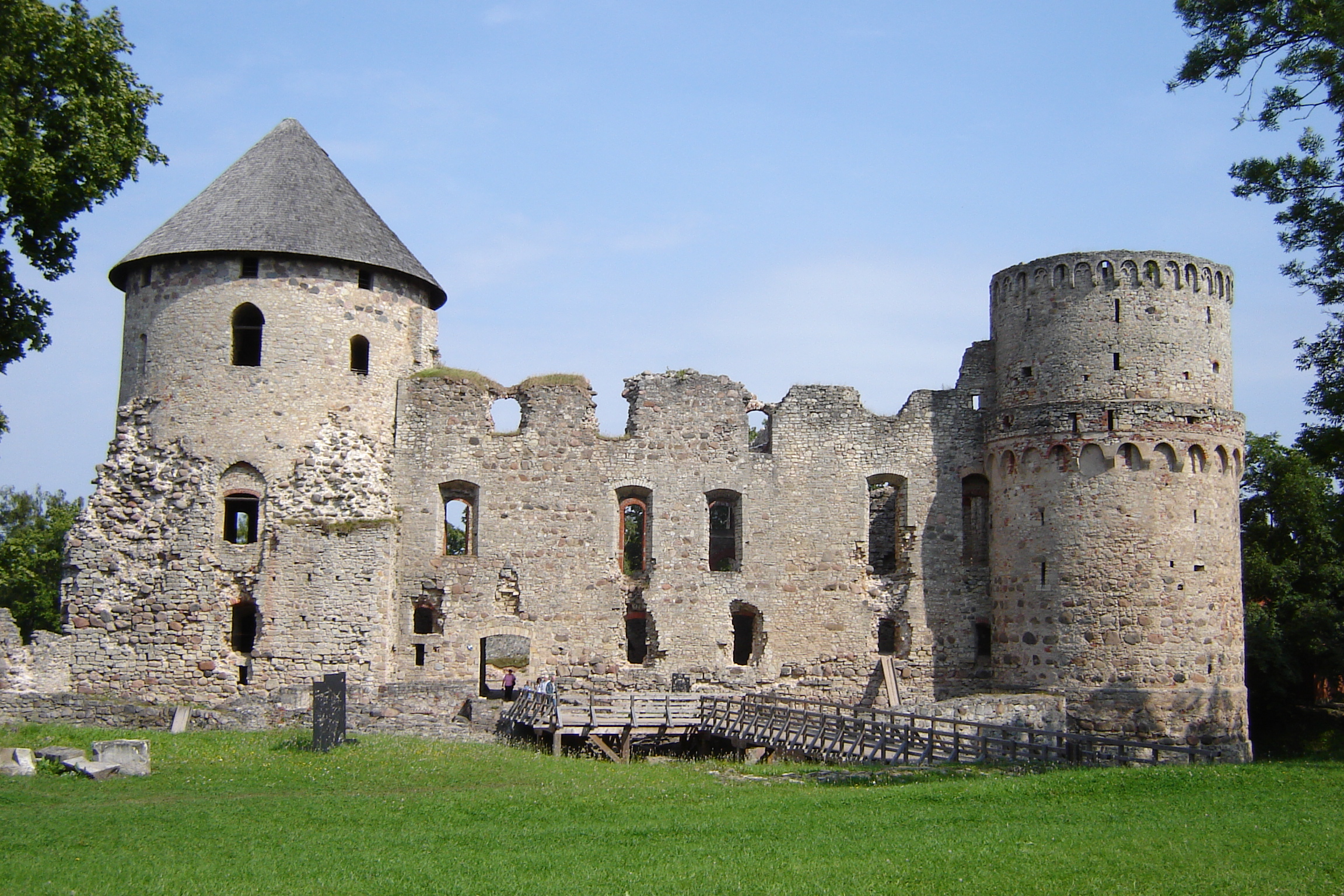 Cesis, Ruine der Ordensburg